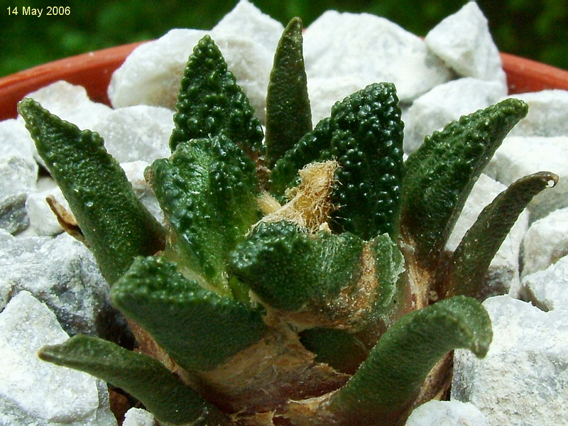 Ariocarpus bravoanus hintonii Mexico - N San Luis Potosi, S Matehuala.